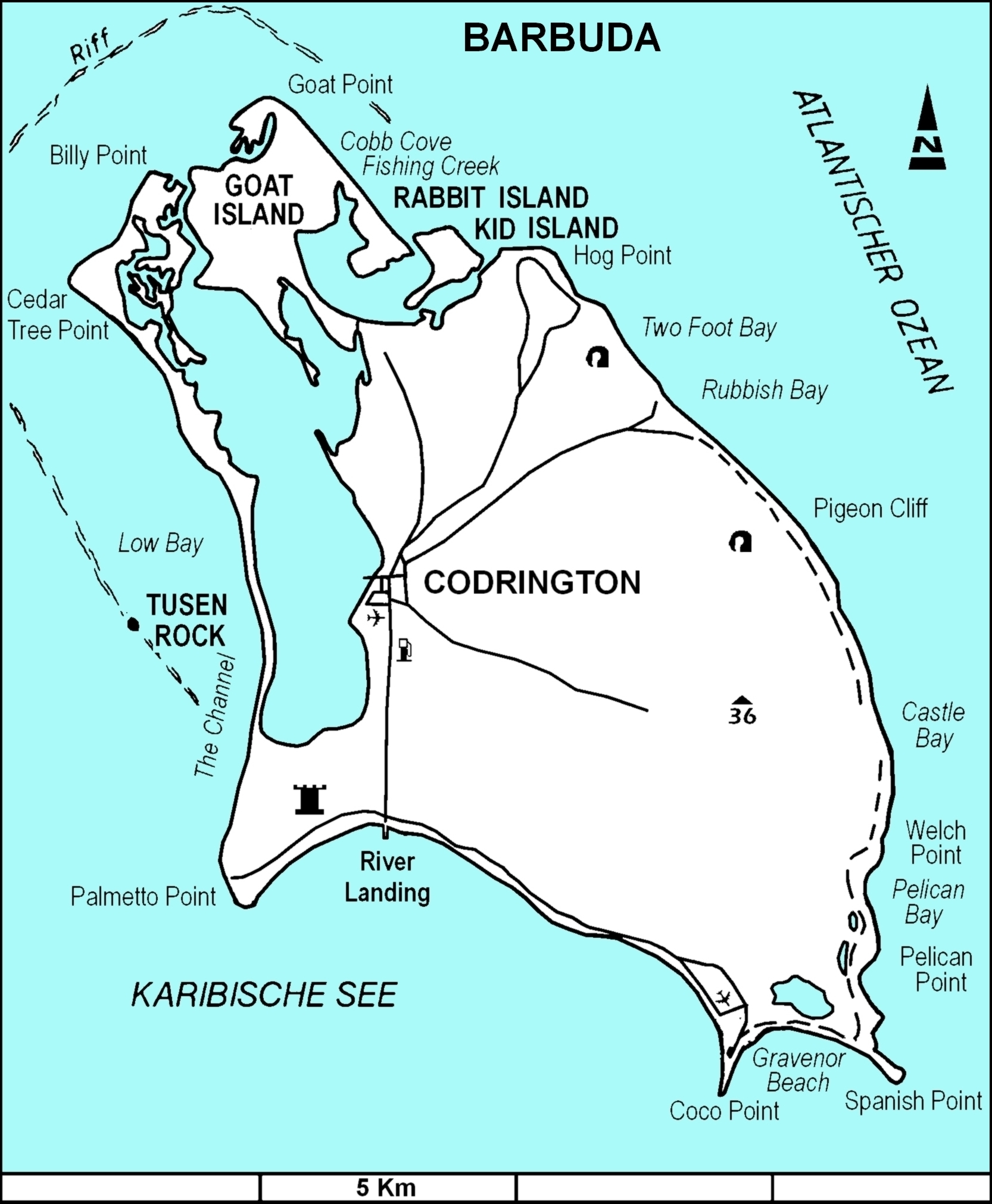 Karte von Barbuda